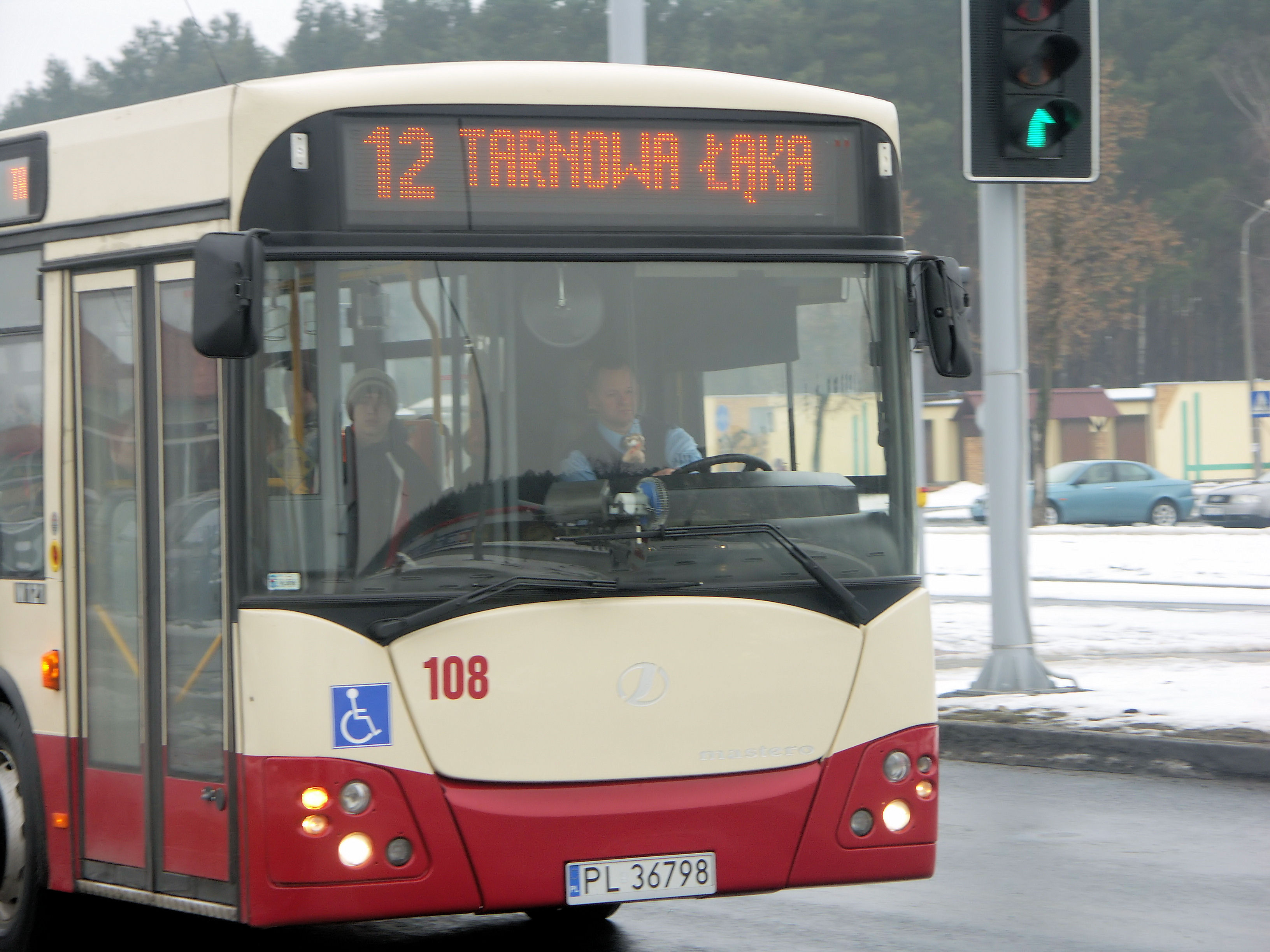 Jelcz M121 o numerze bocznym 108